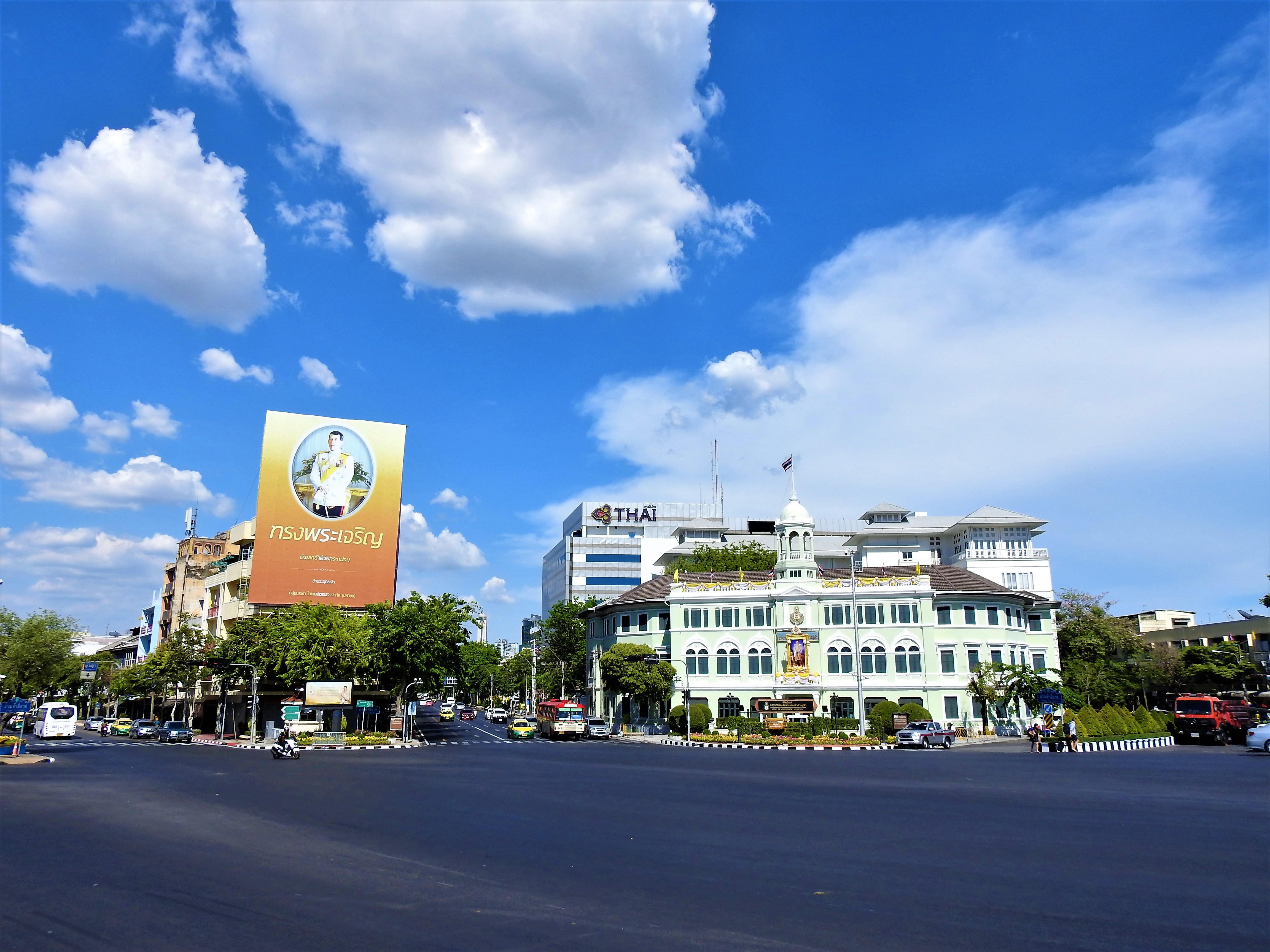 กรมโยธาธิการ (อาคารหลังเก่า)